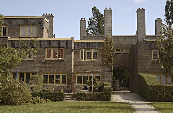 Tuinwijk Haarlem Zuid, ontworpen door J. van Loghem, ca. 1920-1922. Tuinwijk Haarlem Zuid is gebouwd in Engelse cottage-stijl.Spaarnelaan 11-41, Haarlem;Zonnelaan 1-17, Haarlem;Tuinwijklaan 1-43, 2-44, Haarlem. Rond een gemeenschappelijk tuin bouwde Van Loghem 86 middenstandswoningen in U-vorm. De woningen hebben afwisselend twee of drie verdiepingen. Zie de beschrijving